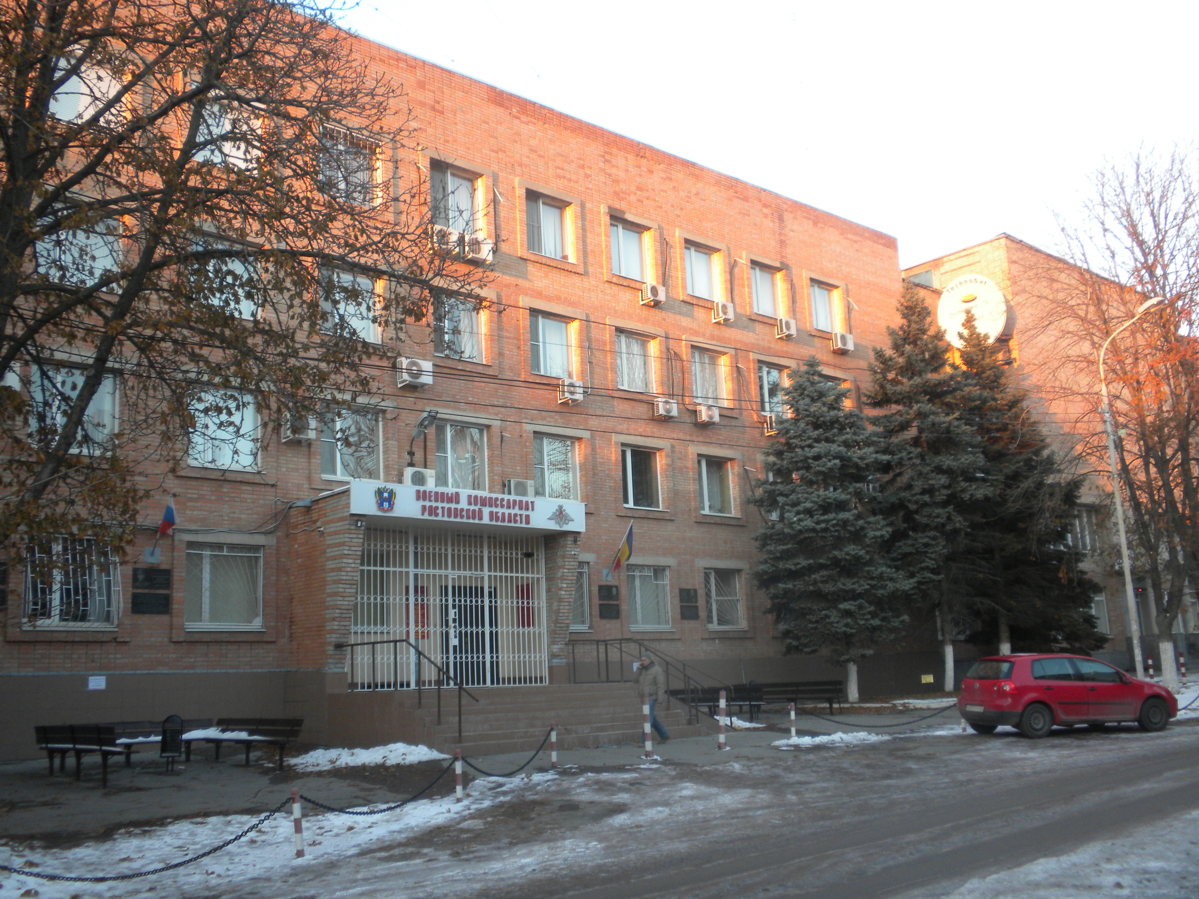 Ростов-на-Дону, улица города Волос, областной военкомат